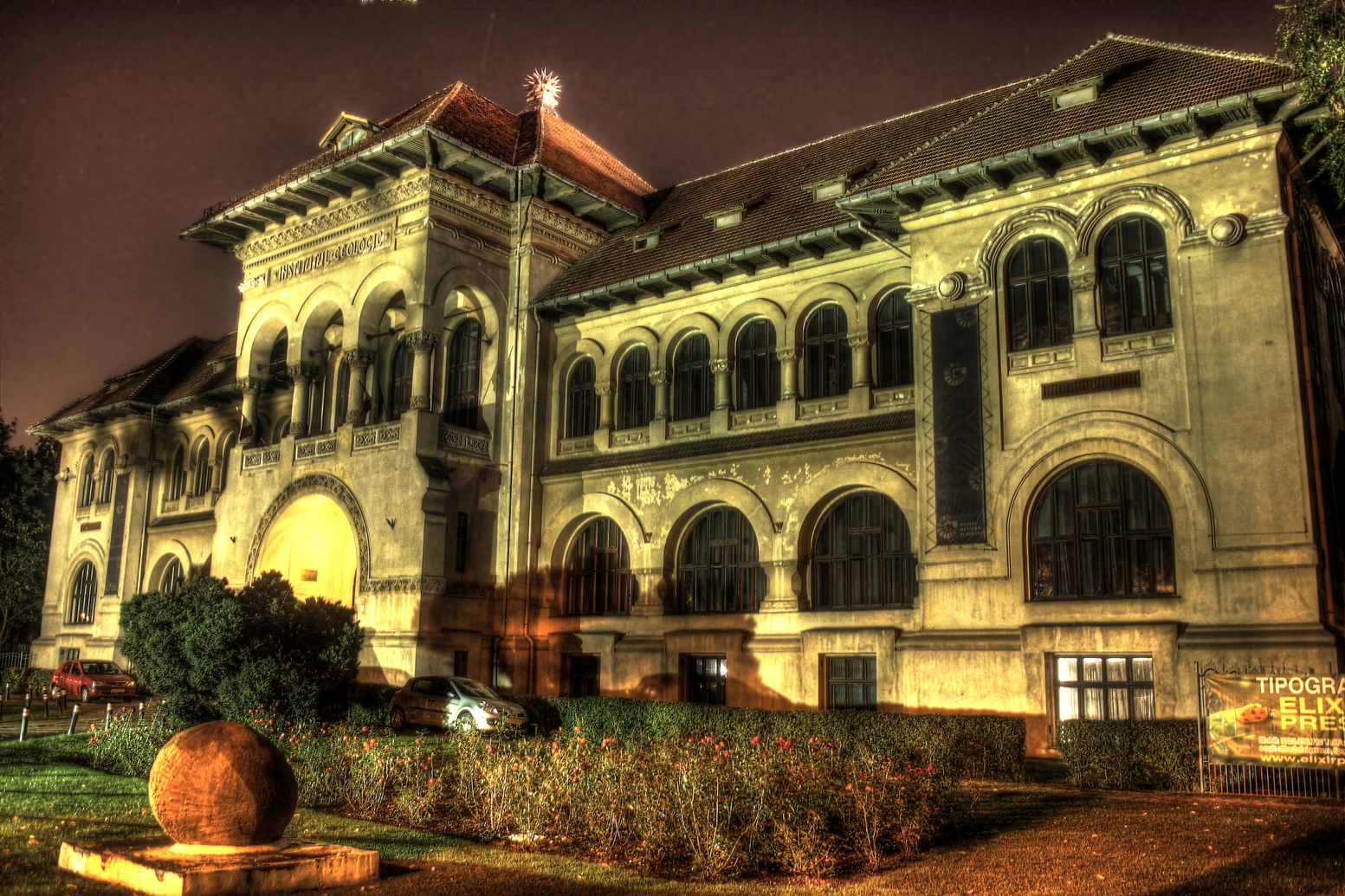 Muzeul National de Geologie, noaptea, NDR